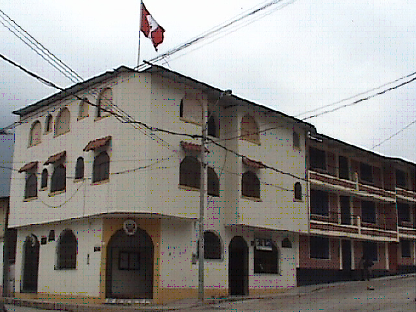 juzgado canta